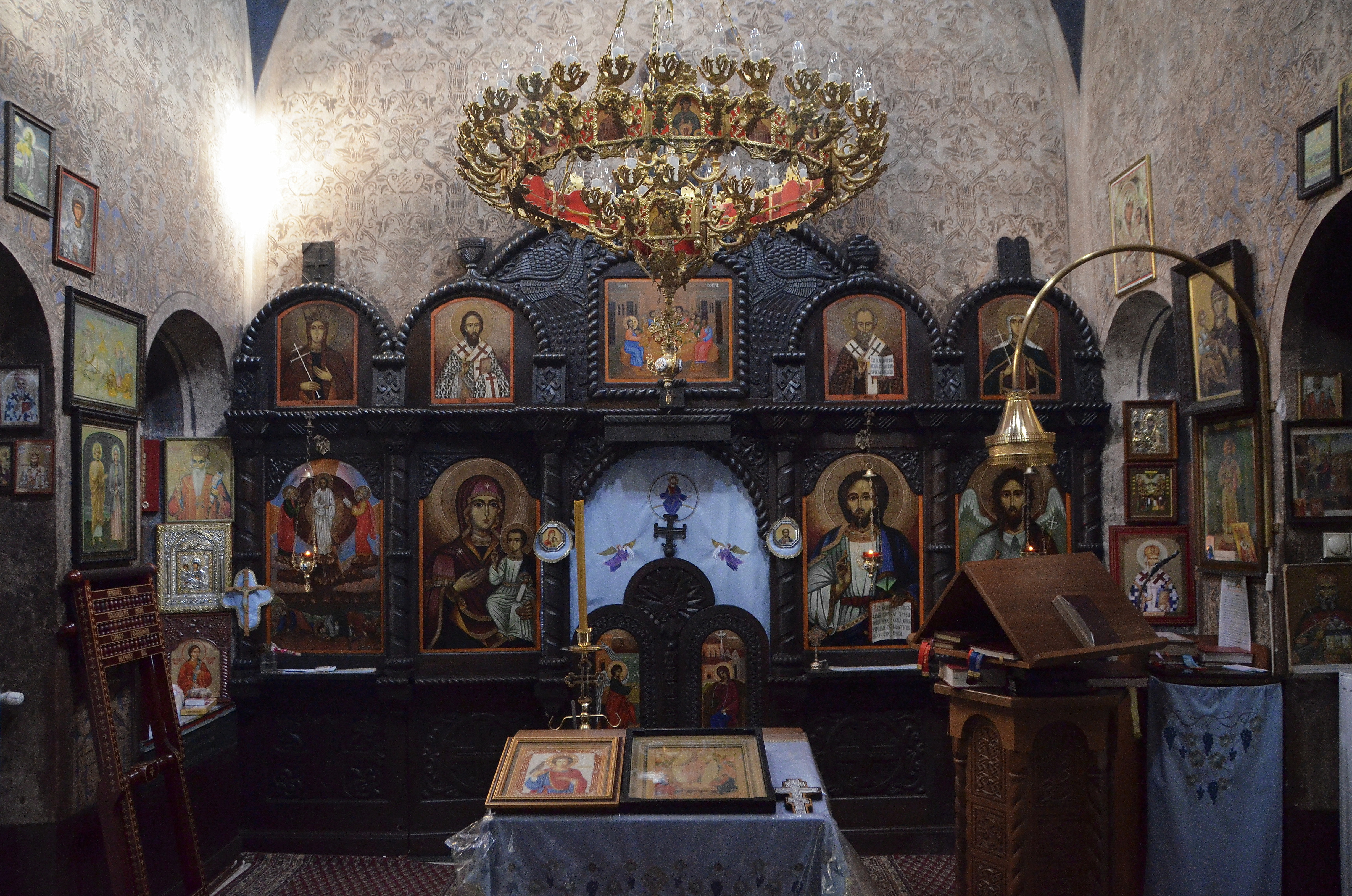 Манастир је мушки. У њему владају посебна монашка правила.